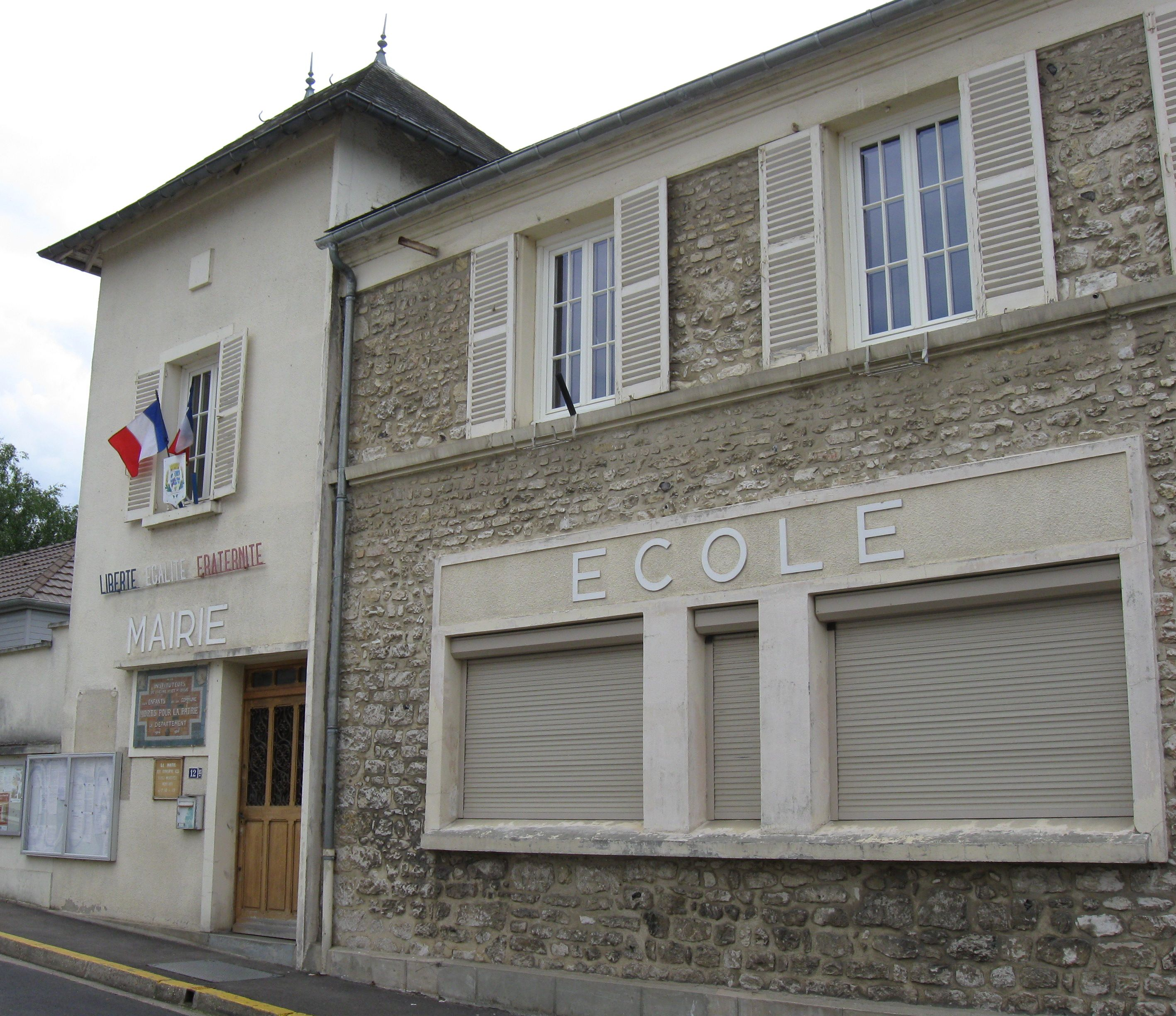 Mairie-école de Gommecourt. (département des Yvelines, région Île-de-France).